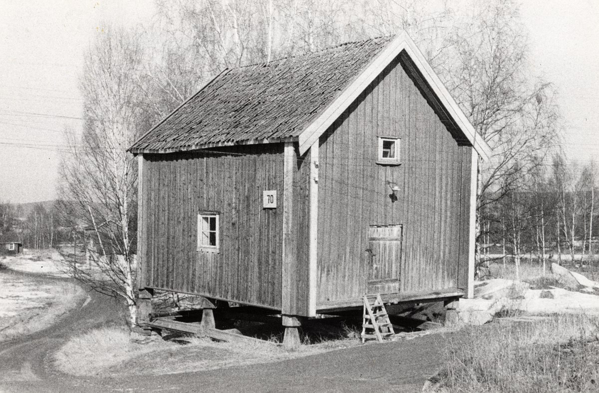 Fredet telthus på Helgelandsmoen i Hole kommune.